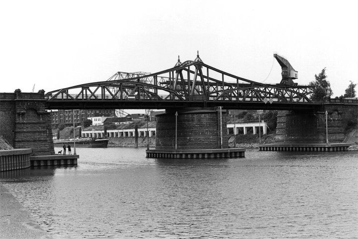 Drehbrücke in Krefeld-Linn, Hafenstraße, Denkmal Nr. 613 This image shows a heritage building in Germany, located in the North Rhine-Westphalian city Krefeld (no. 613).